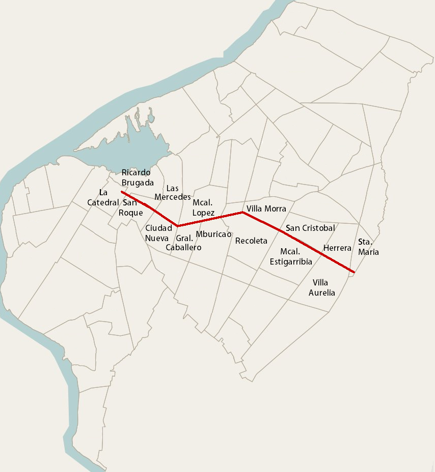 Mariscal López Avenue in Asunción, Paraguay